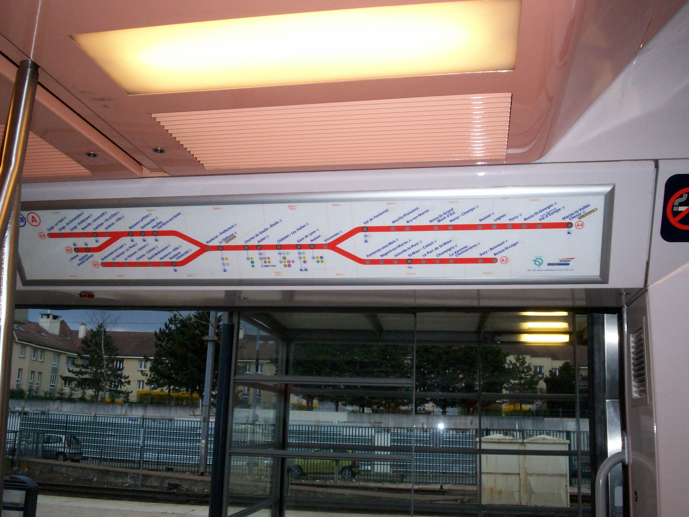 Intérieur d'un MI2N Altéo